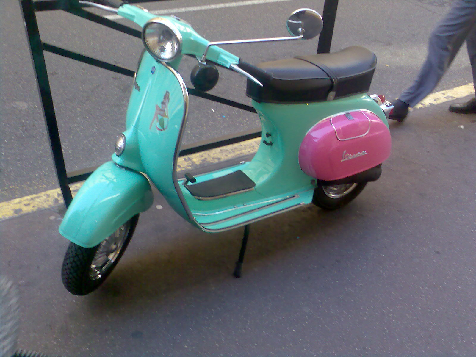 una vespa bicolore fotografata a Montecarlo